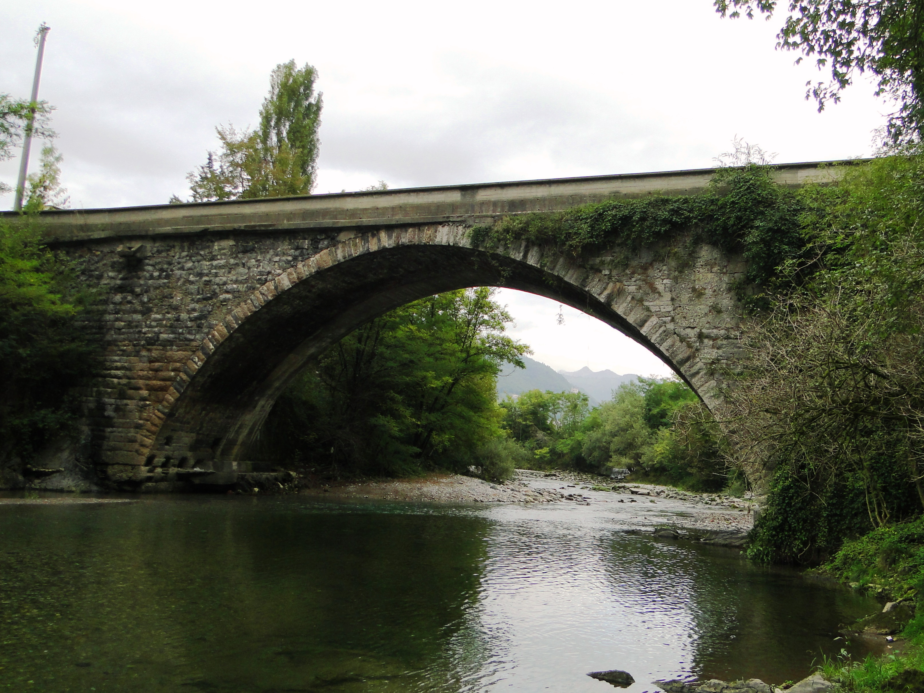 Ponte sul Serio tra Fiorano al Serio e Casnigo (BG)